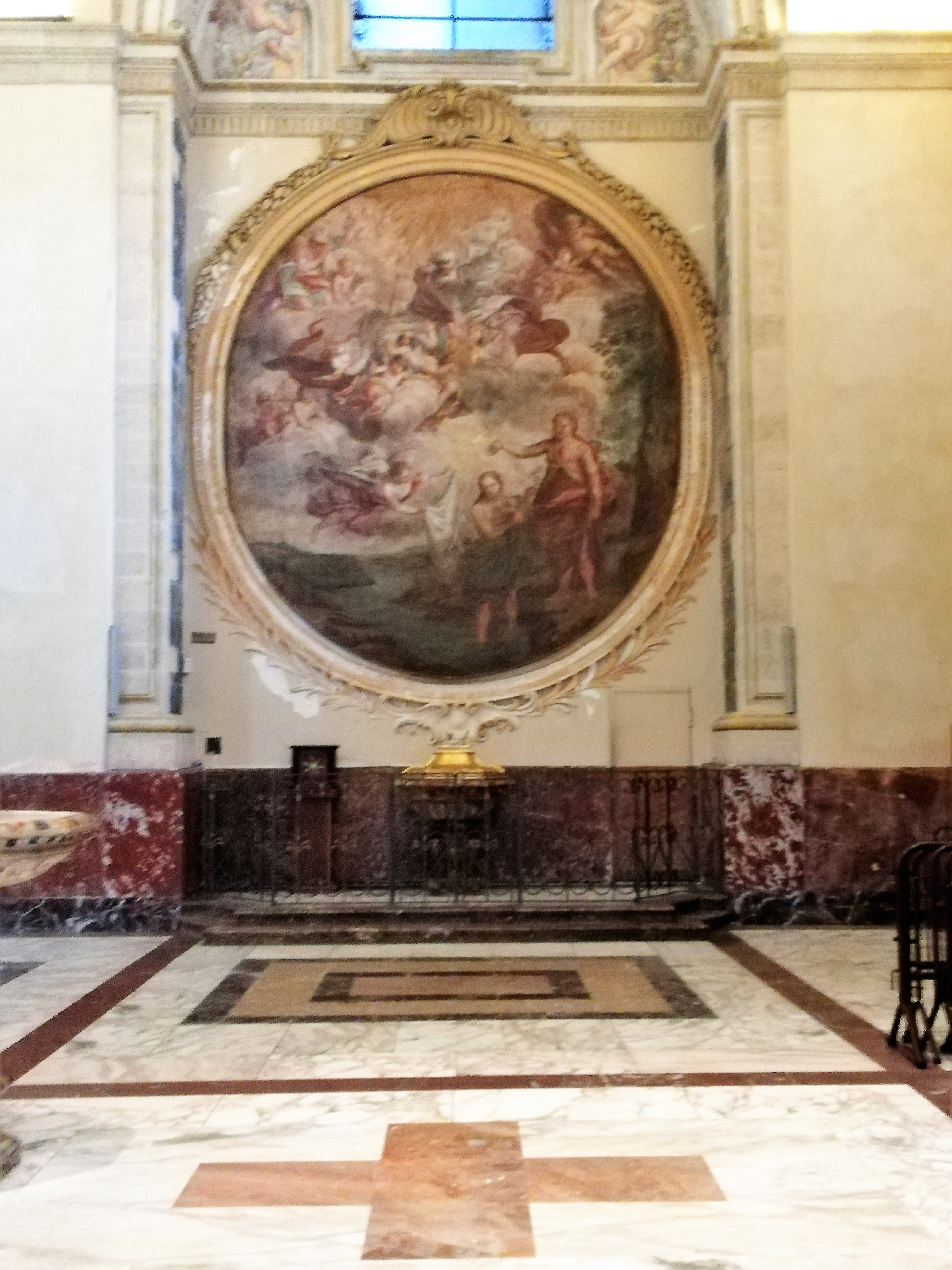 Fonte battesimale. San Giovanni Battista e il Battesimo di Gesù nel fiume Giordano, opera di Giovanni Tuccari.